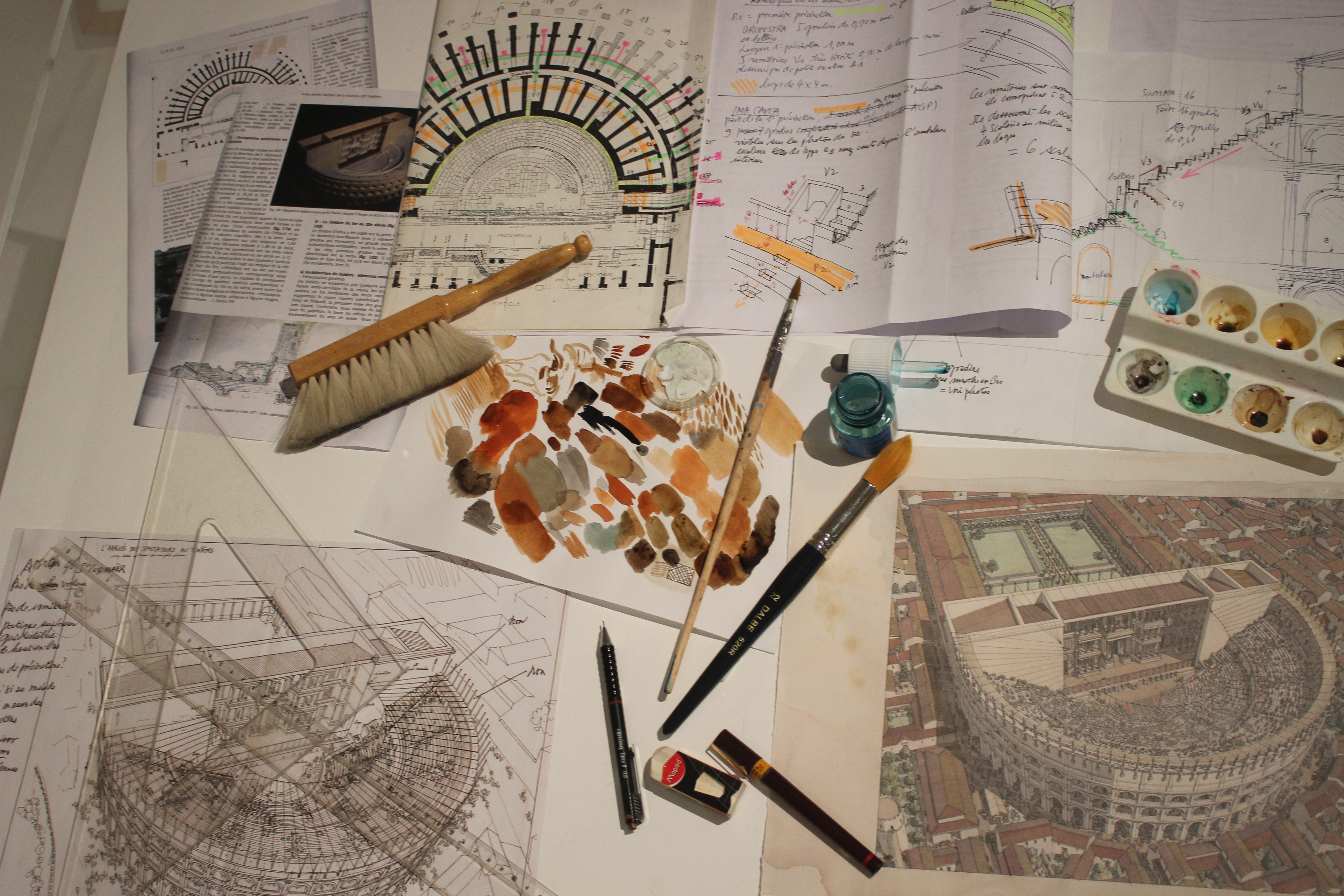 présentation d'une planche du travail de l'architecte, historien, aquarelliste Jean-Claude Golvin au musée de Vieux la Romaine juin 2015